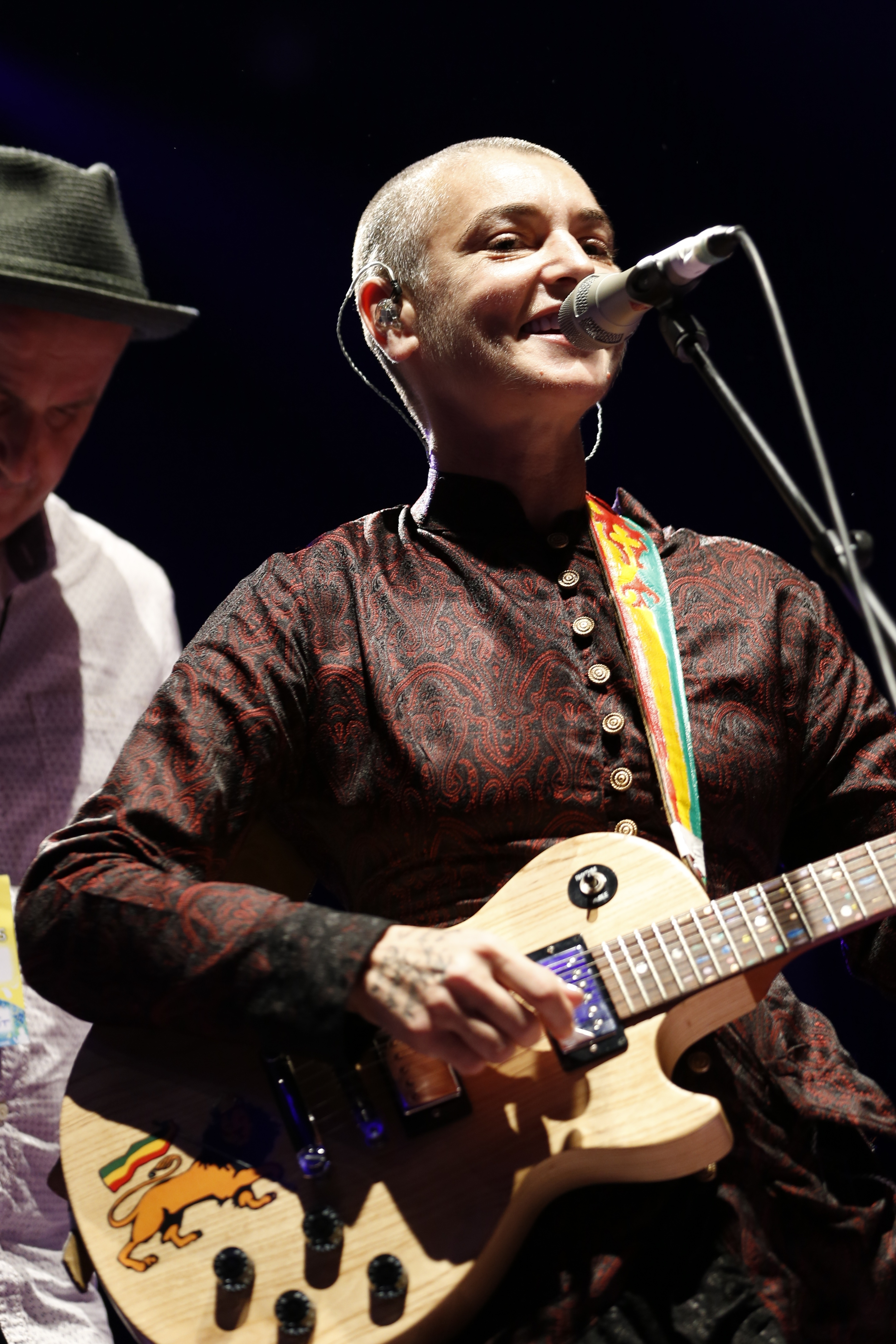 Sinéad O'Connor lors du Festival interceltique de Lorient, le 10 août 2013.